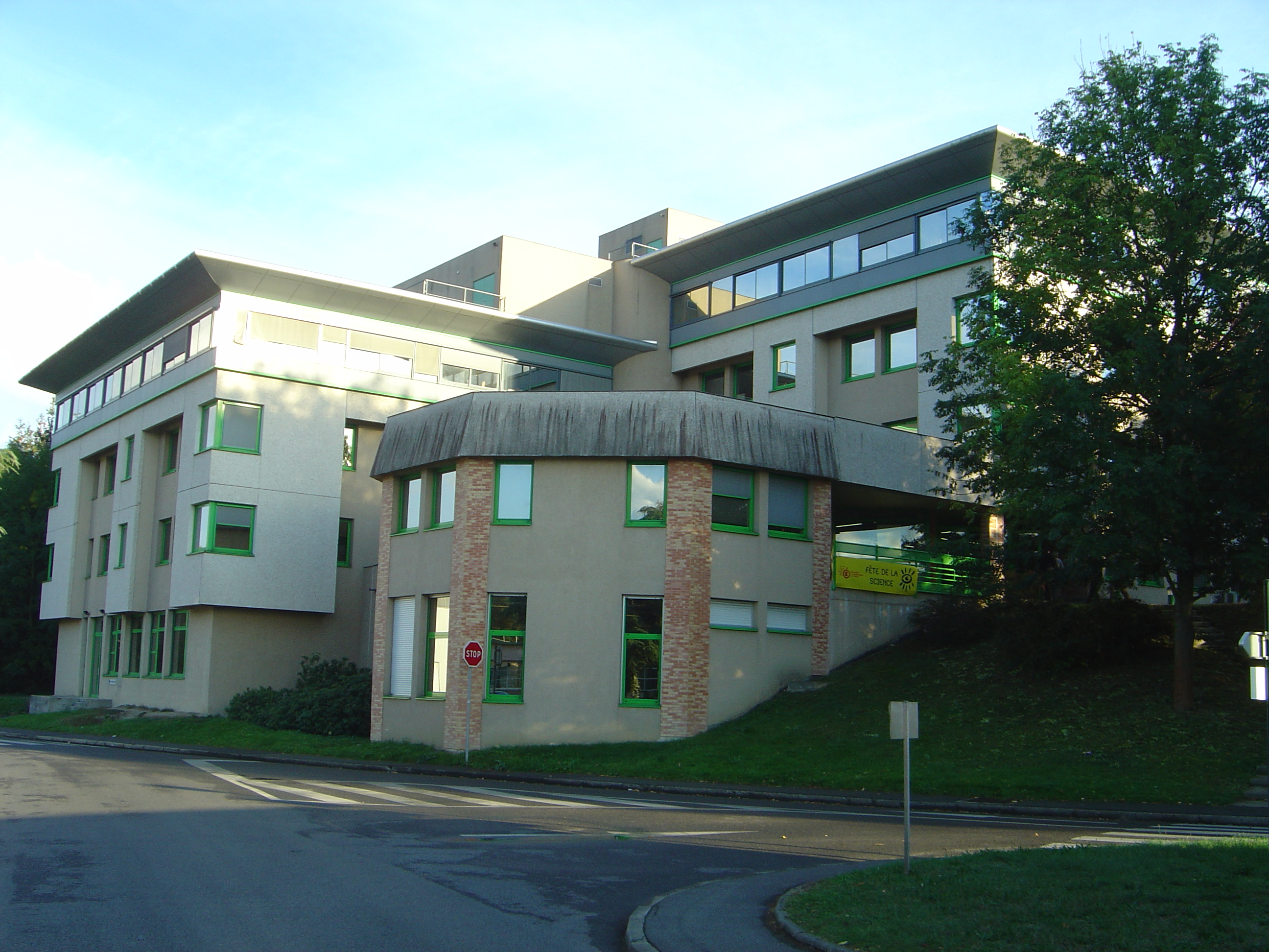 Institut d'astrophysique spatiale Bâtiment 121 Université Paris-Sud (Orsay) Journées de la Science 2005